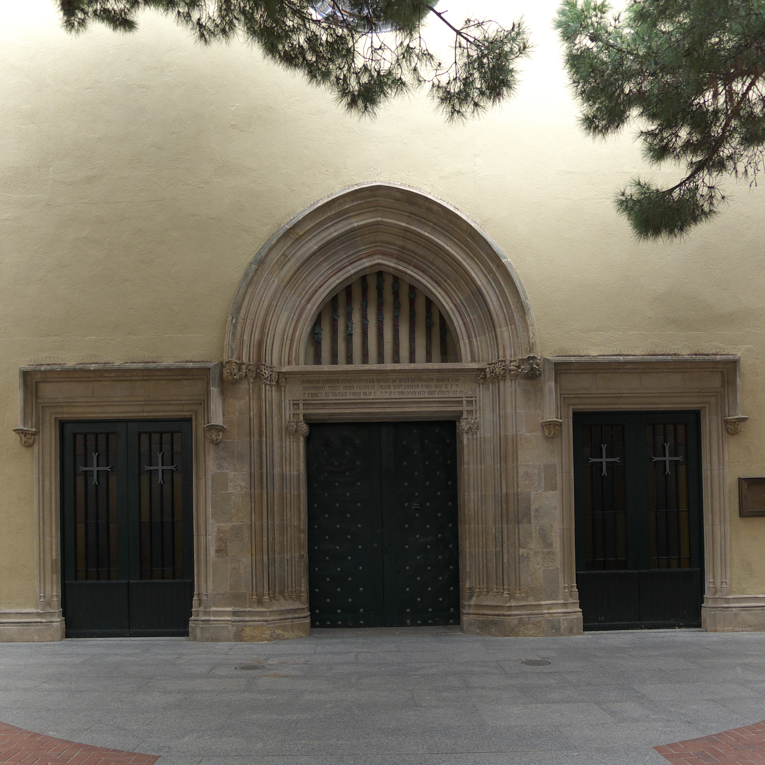 Puerta de los pies de la iglesia.